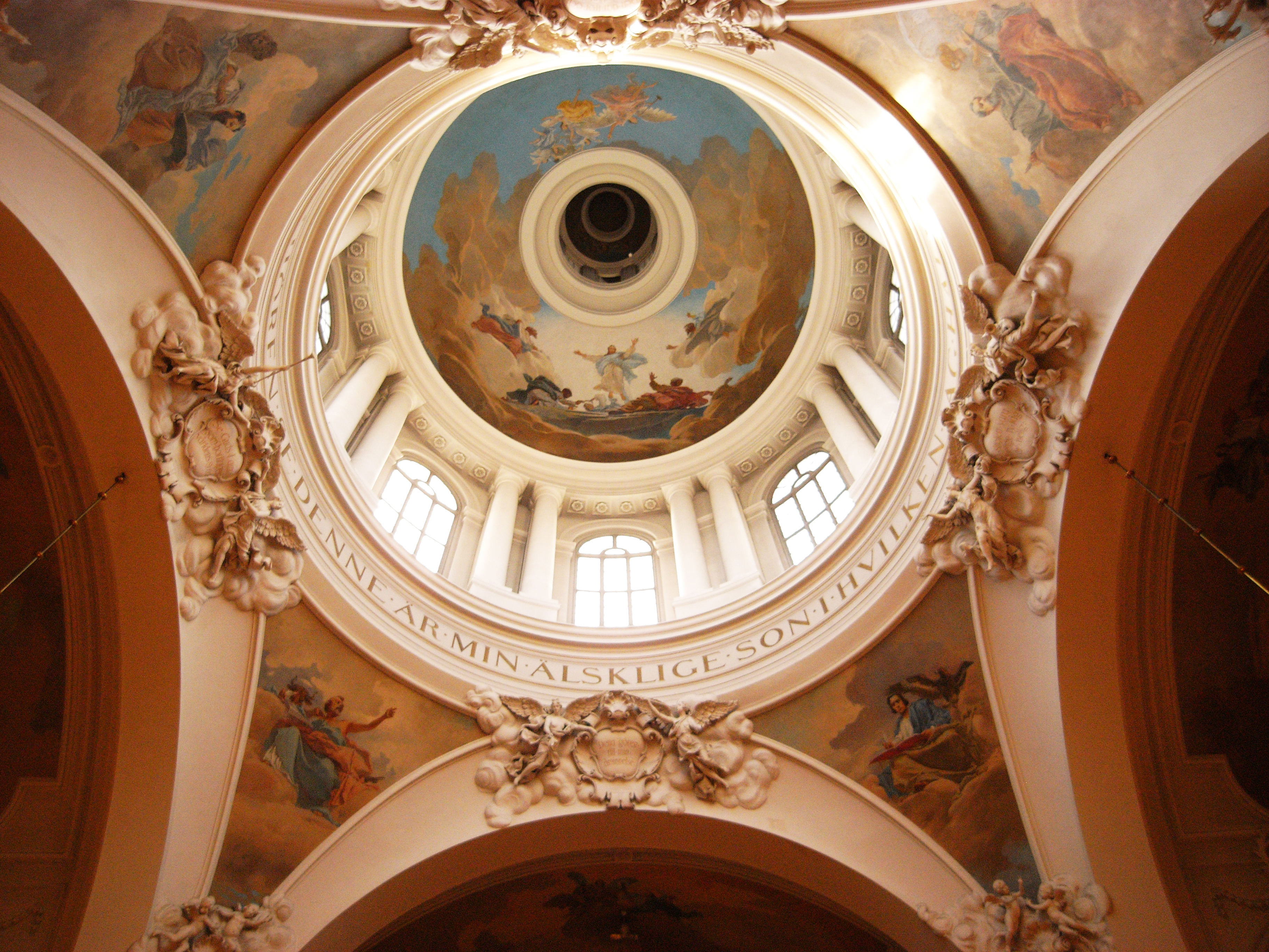 Gustaf Vasa kyrka (Syrenen 1)